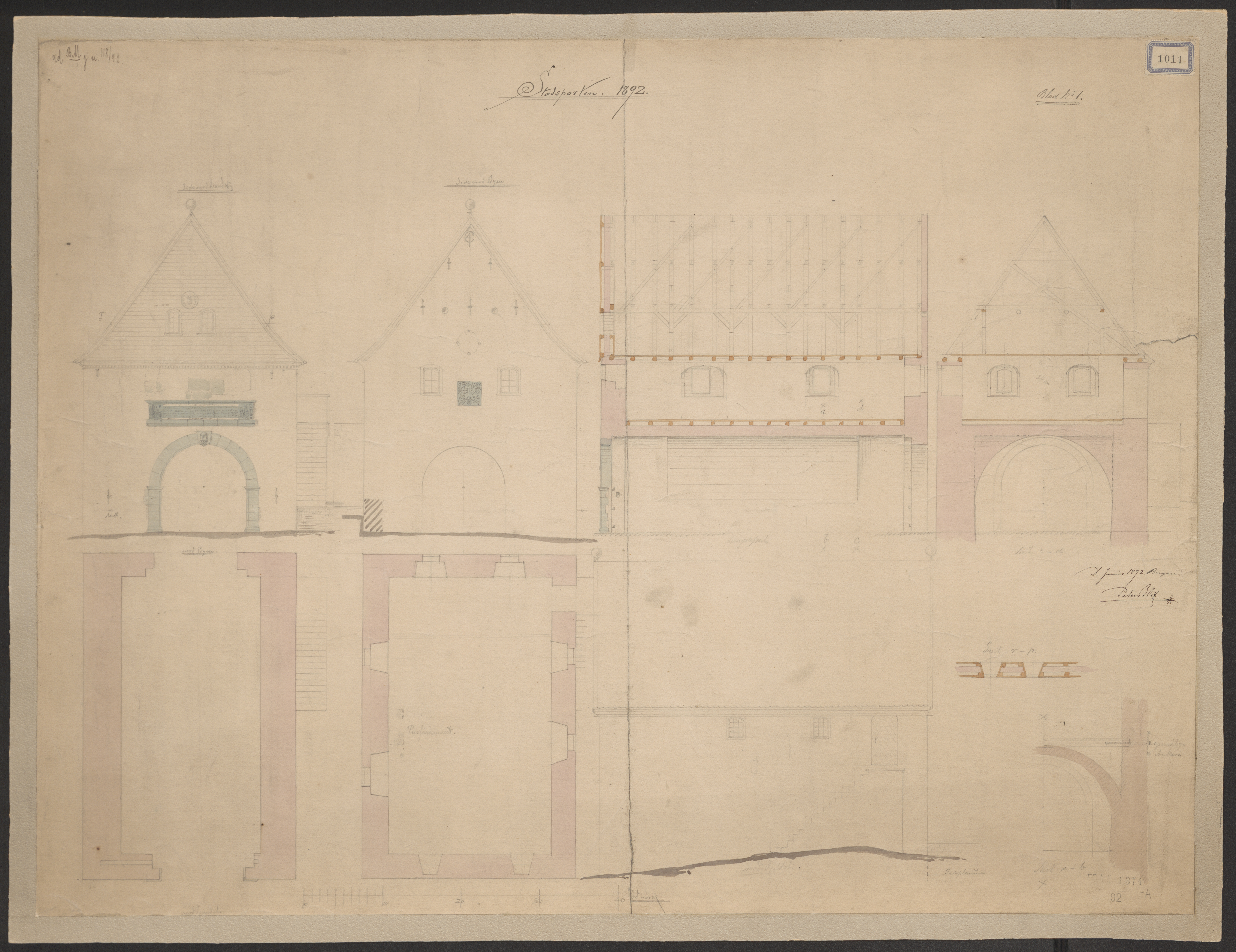 Bildet er hentet fra Riksantikvaren. plan av 1 og 2 etasje, tverrsnitt, langsnitt, gavlfasade, _ langfasade. Detalj av vinduer i 2 etasje. Detaljsnitt gjennom _ bueåpning. (FF kat.nr. 1011) Eier : Fortidsminneforeningen Sted : Norway, Hordaland, Bergen Emneord: BYPORTER Medium : "Blyant;Akvarell"